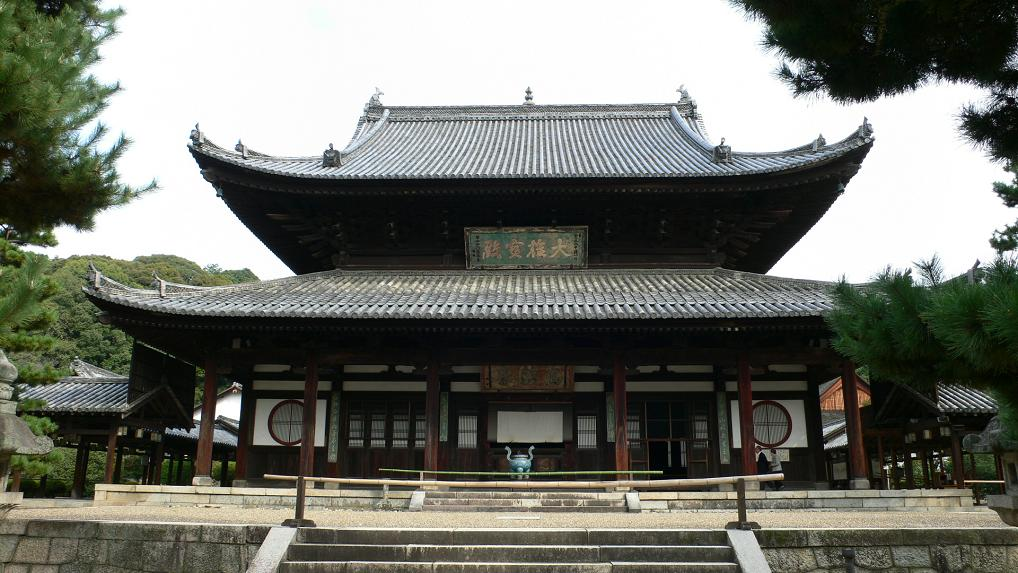 Manpuku-ji Temple in Kyoto taken on October 26 2005